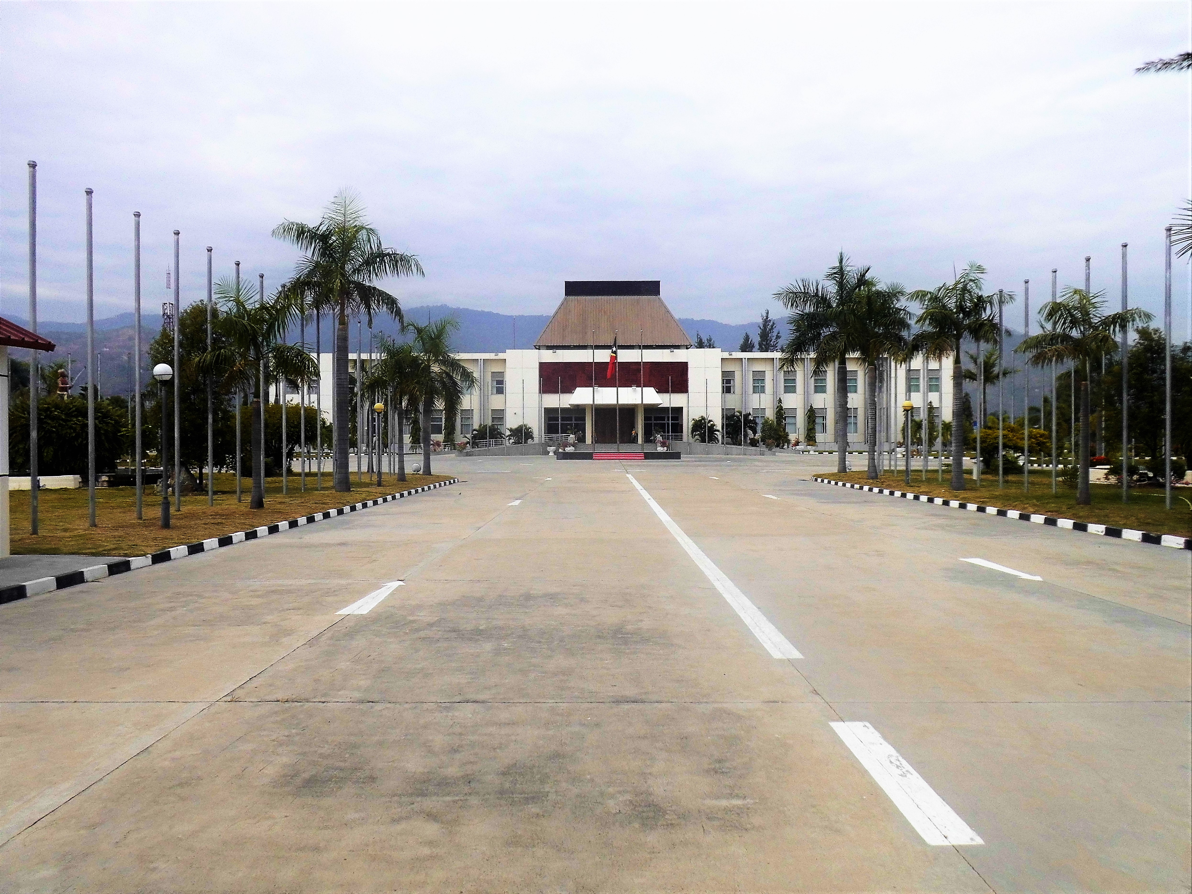 Präsidentenpalast in Dili